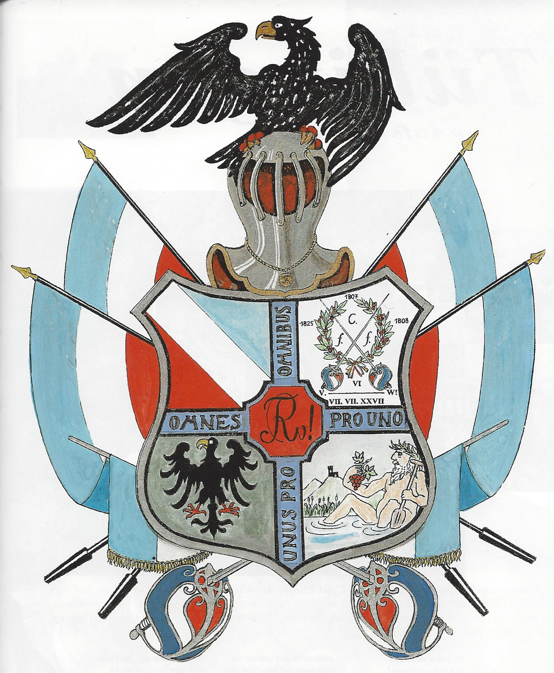 Großes Bundeswappen des Corps Rhenania zu Tübingen